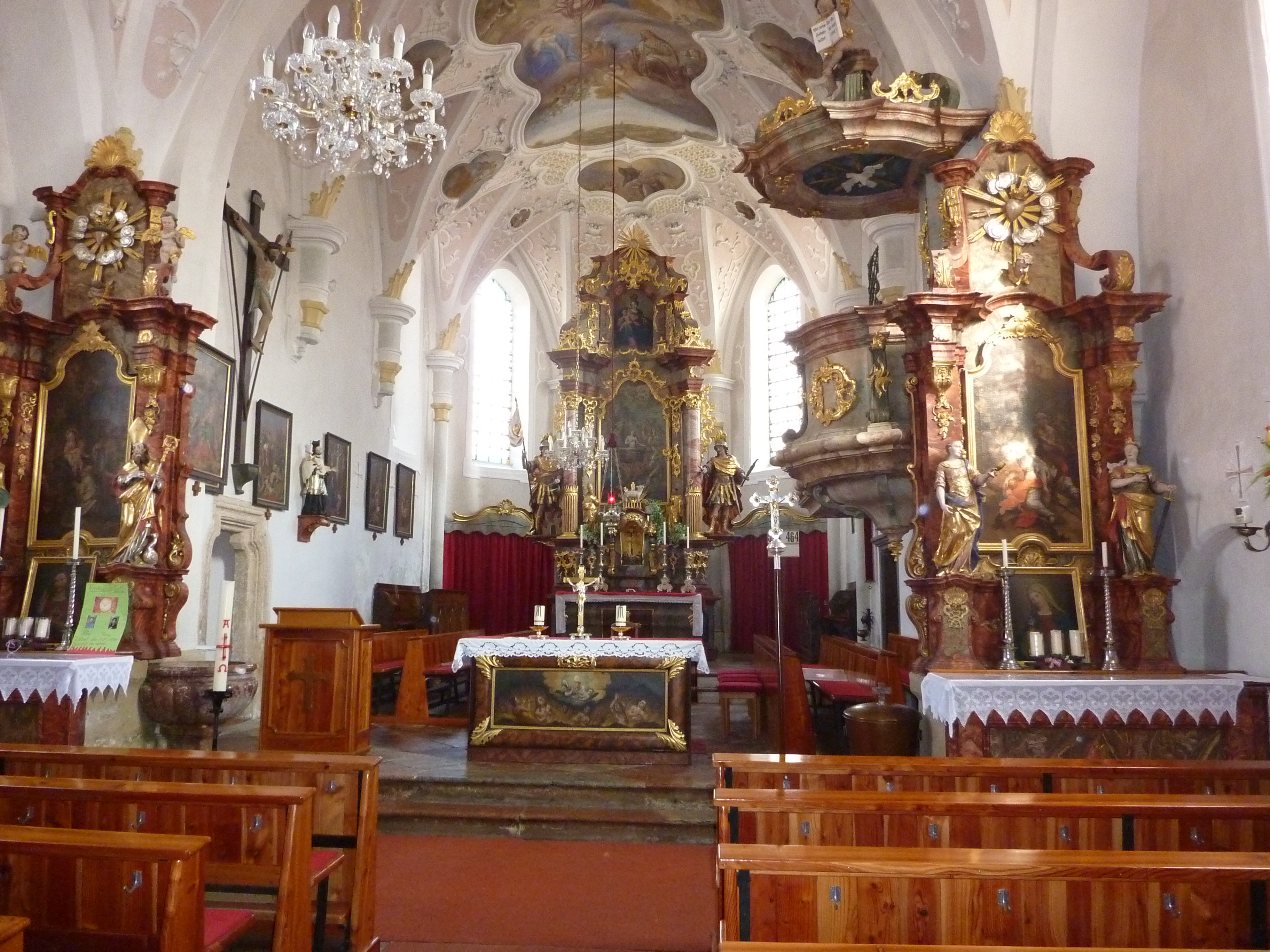 Kath. Filialkirche hl. Veit, Sankt Veit im Innkreis, Oberösterreich